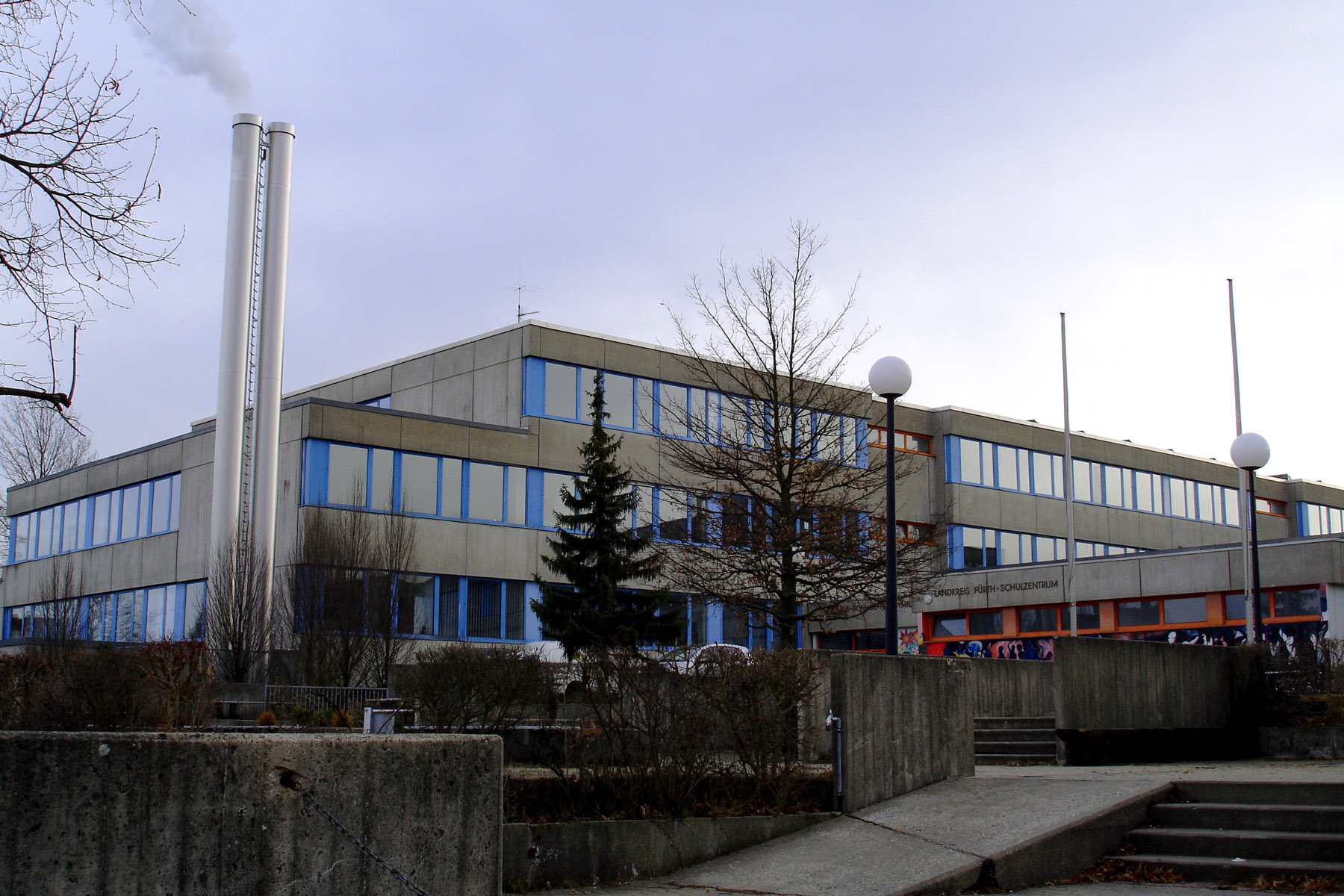 Dietrich-Bonhoeffer-Gymnasium Oberasbach (Haupteingang; Blickrichtung: Südosten)